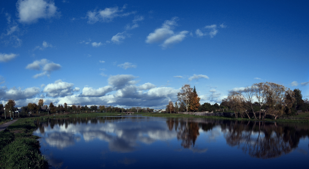 Вид на реку Калиницу